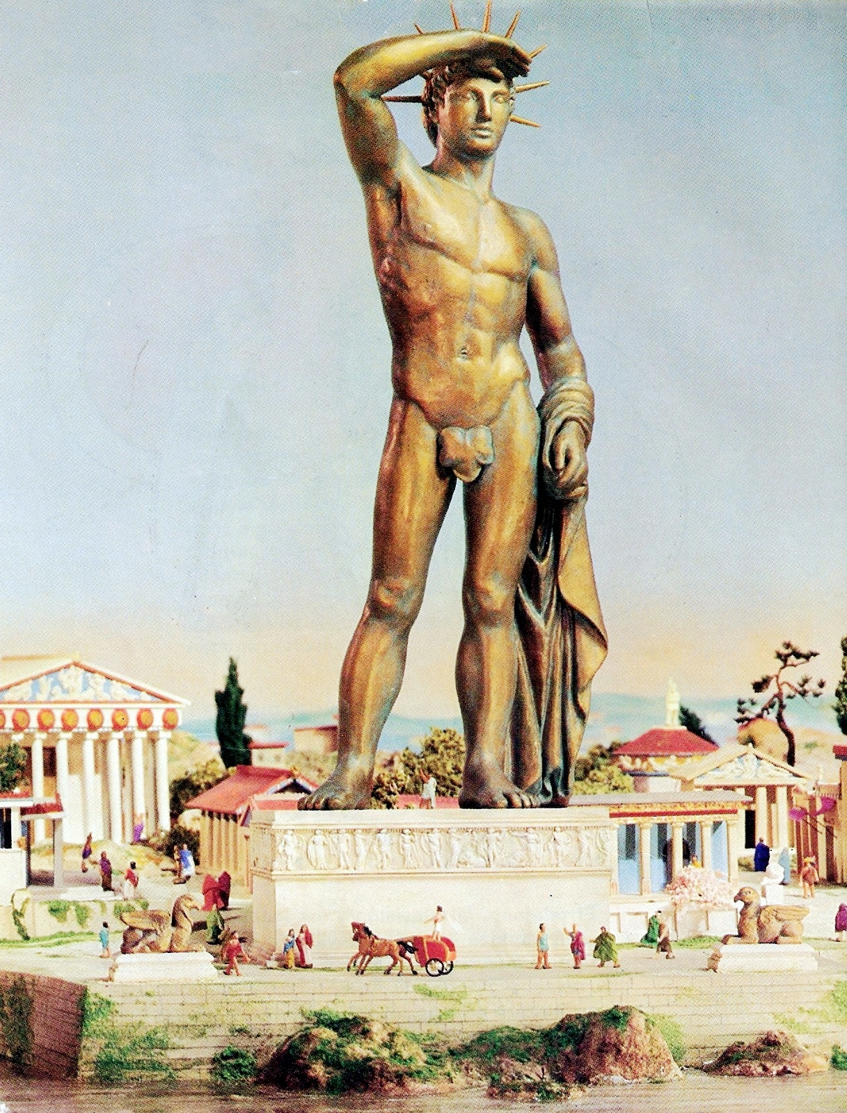 El coloso, su posible aspecto.